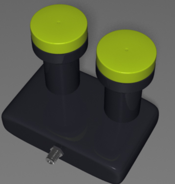 Są to dwa konwertery w jednej obudowie umieszczone obok siebie + wbudowany przełącznik DiSEqC. Konwerter ten zastępuje układ dwóch pojedynczych konwerterów zamontowanych w układzie zez (każdy konwerter odbiera sygnał z innego satelity).Konwerter ten stosuje się dla anten średnicy 80-90 cm , w Polsce dla satelit HotBird i Astra. Konwerter ten posiada jedno wyjście przełączanie satelity oraz zakresów i polaryzacji jest sterowane przez odbiornik.